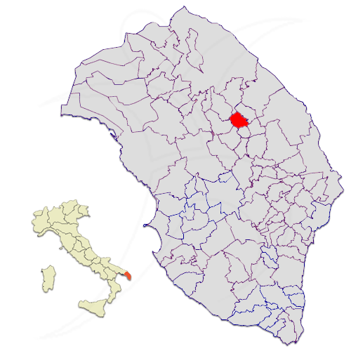 Il territorio del comune di Caprarica di Lecce nella provincia di Lecce.